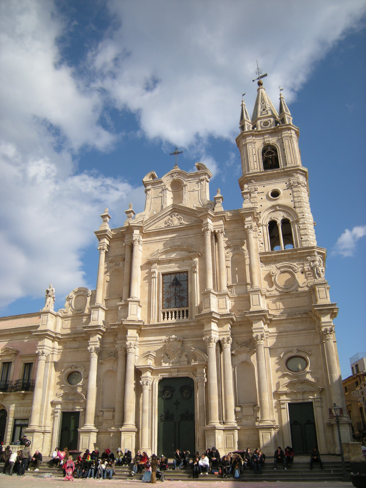 "Basilica dei Santi Pietro e Paolo" (sec XVII) - Acireale (Sicília)